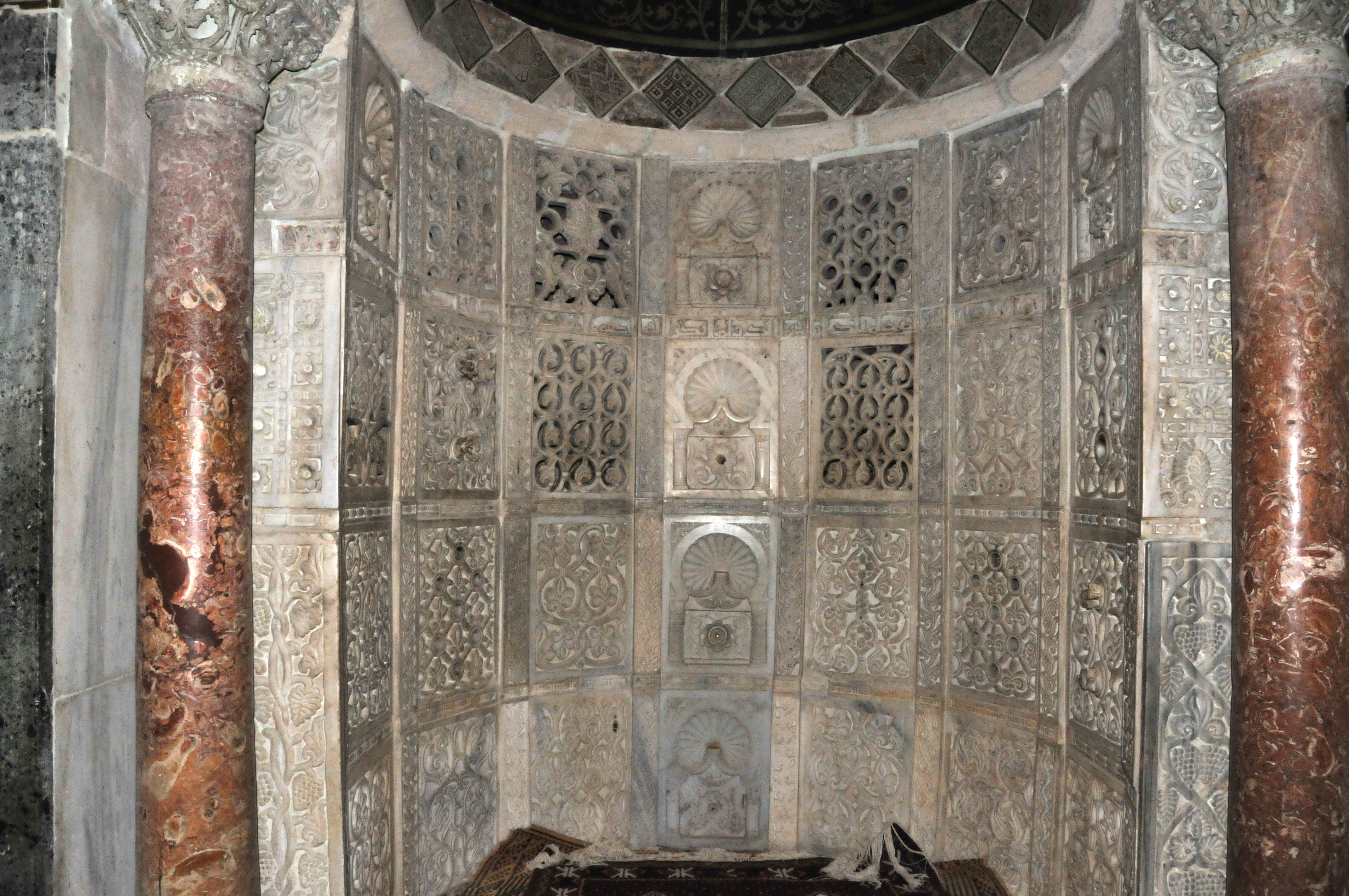 Paroi du mihrab, ornée de panneaux en marbre blanc sculpté, dans la salle de prière de la Grande Mosquée de Kairouan, en Tunisie.